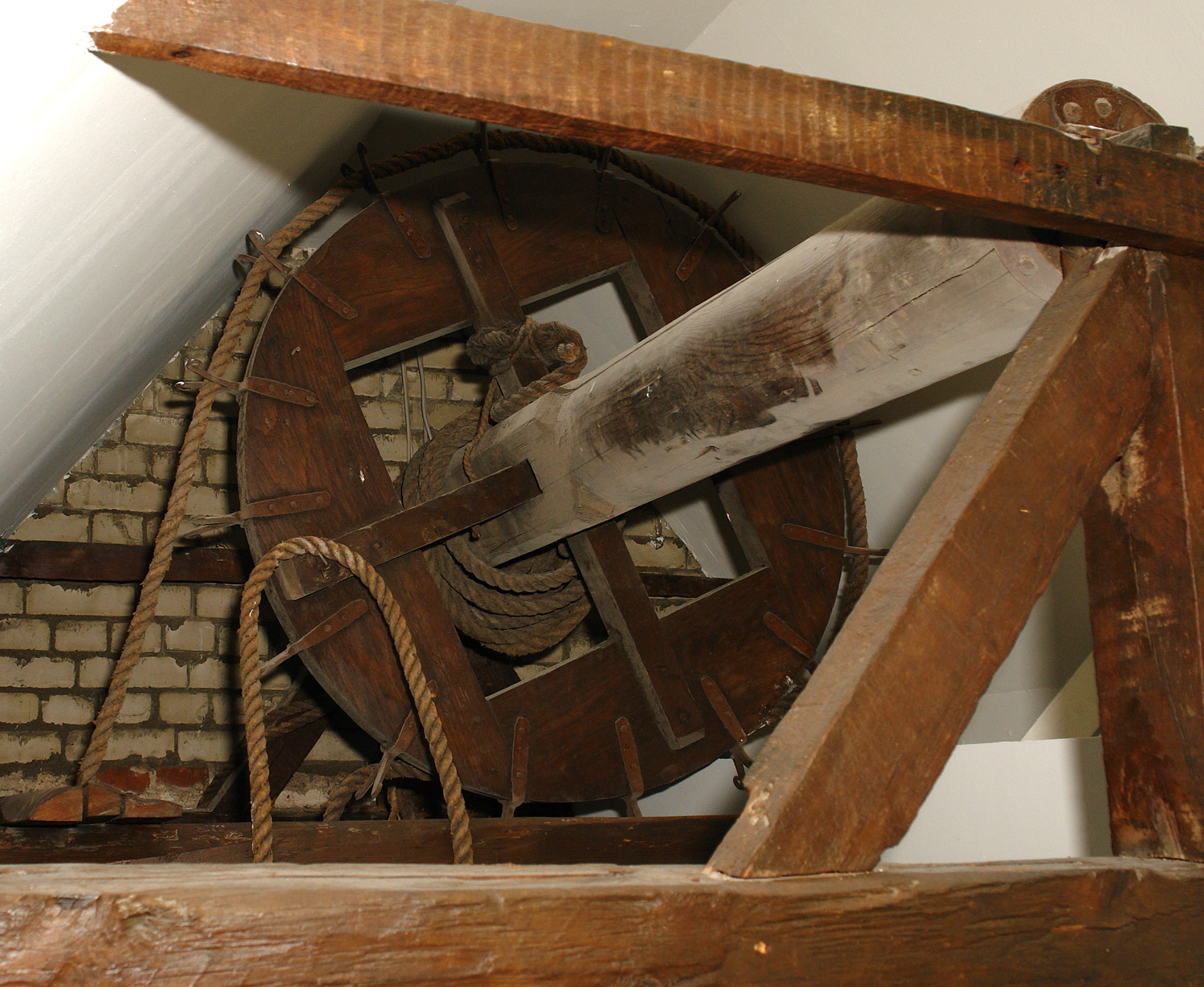 Bremen: Haus Vorwärts in der Sandstraße 4-5. Winde im Dachstuhl, das Holz wurde vor dem Jahr 1500 gefällt